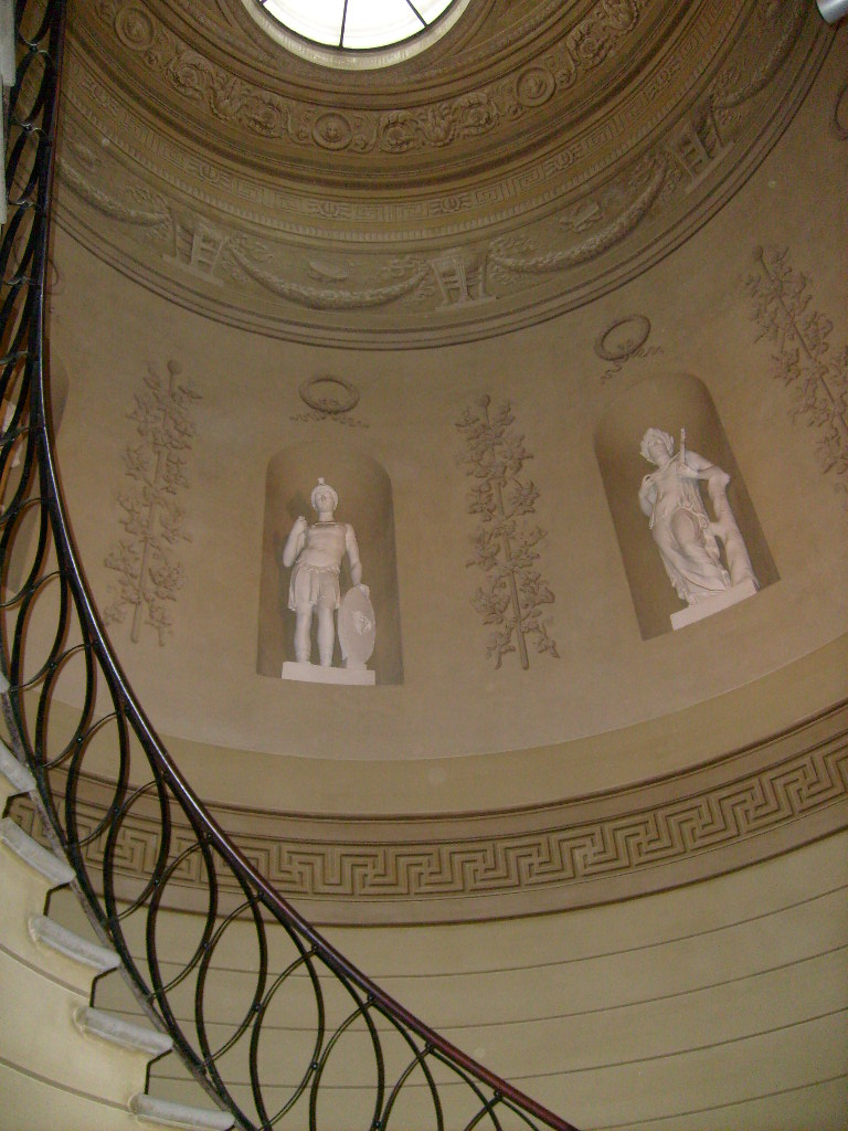 Perspective de l'escalier du Palais Eynard à Genève (Suisse)